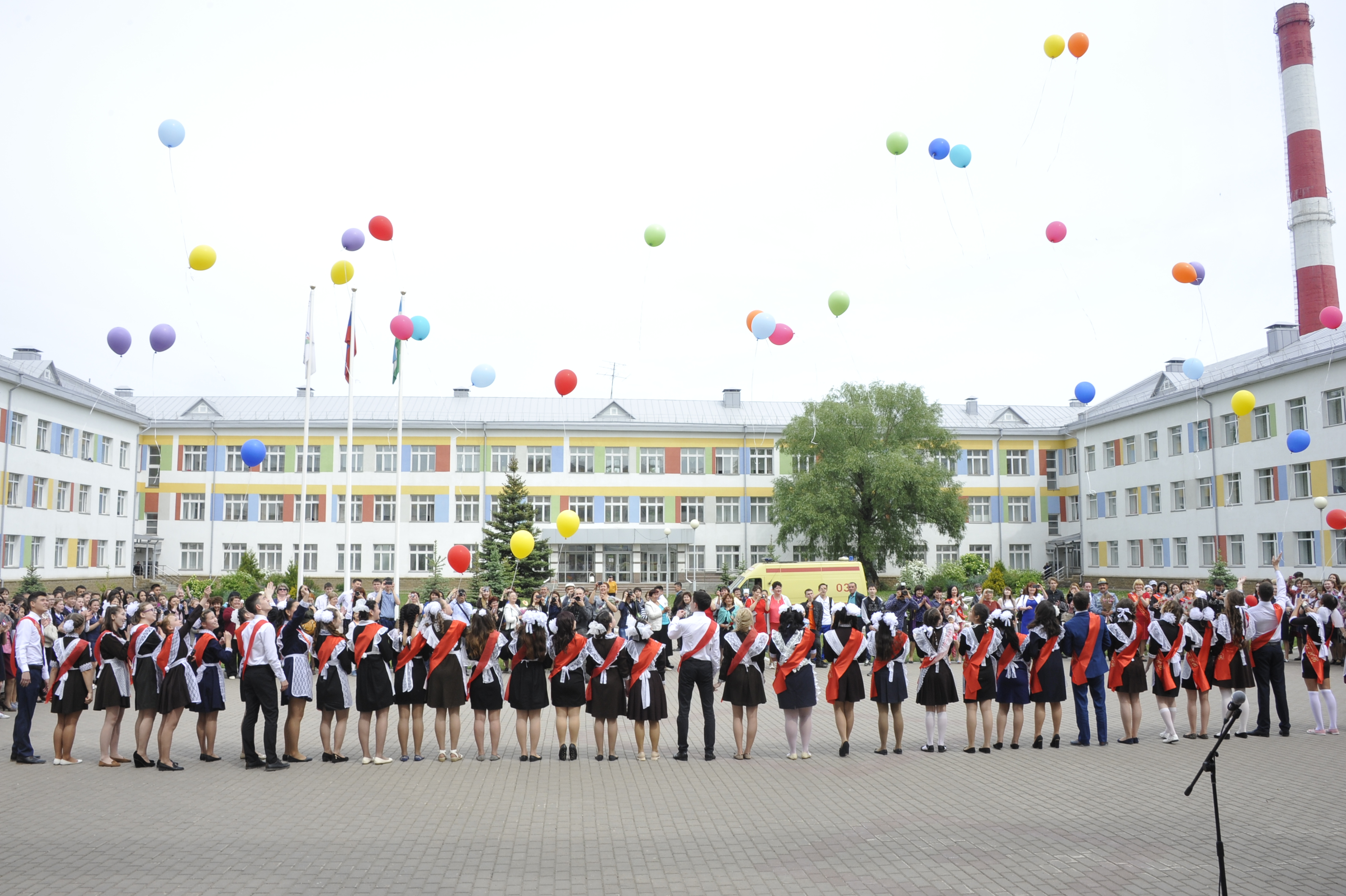 Вручение премии имени Булата Султангареева в республиканском художественном лицей-интернате им.К.Давлеткилдеева